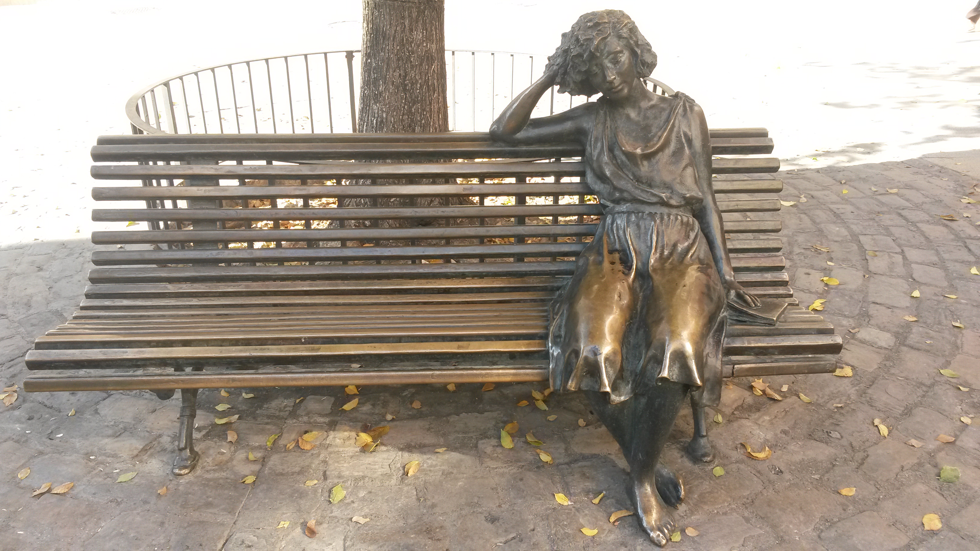 Escultura A l'ombra d'en Ramon Oms a la Plana de l'Om de Manresa.